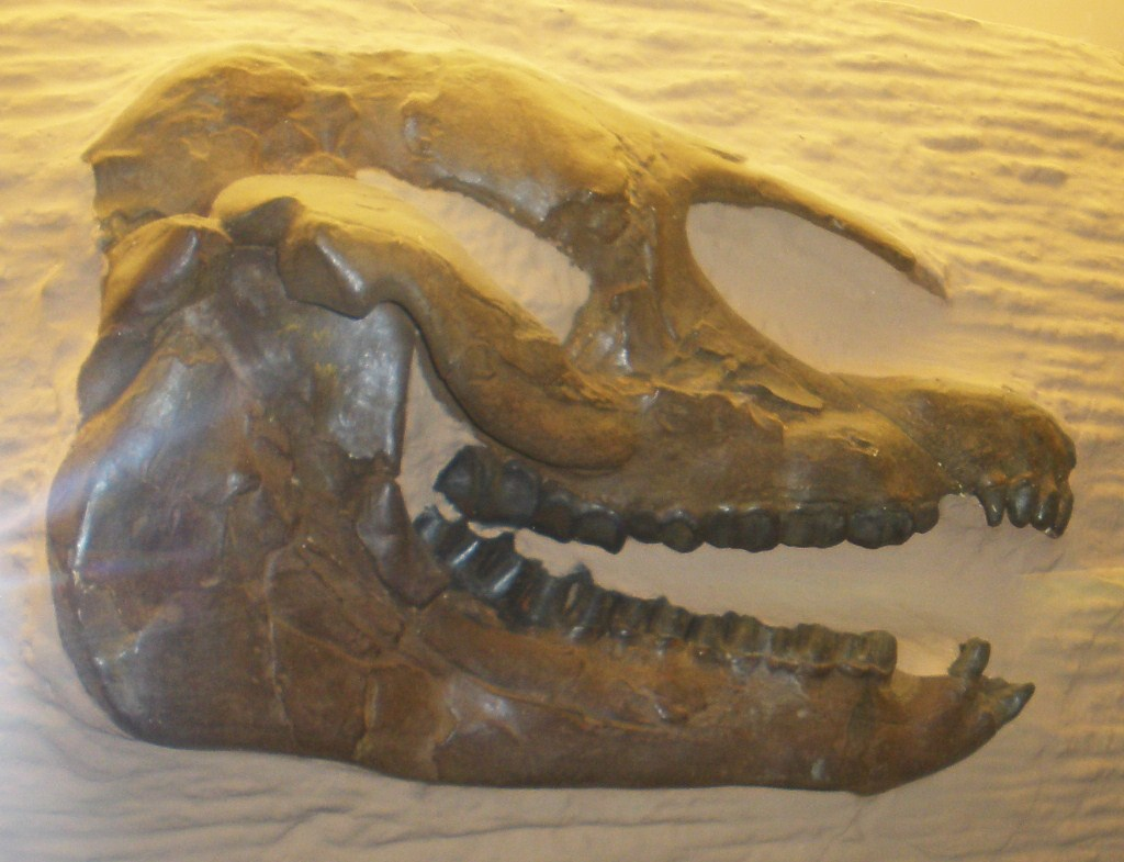 Fossil of Palaeotherium, an extinct mammal- Took the picture at Museo di Paleontologia di Firenze